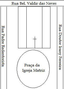 Mapa da Igreja Matriz de Trindade, em Goiás